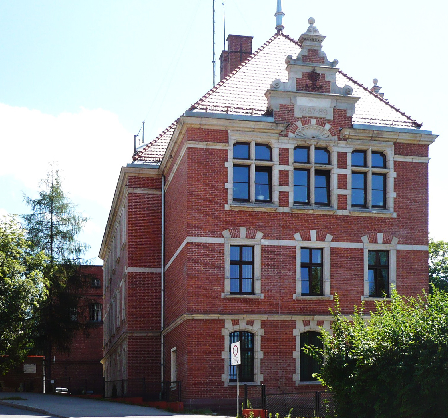 Nowa Ruda, ul. Bohaterów Getta 29 - pierwotnie sąd, obecnie komisariat policji